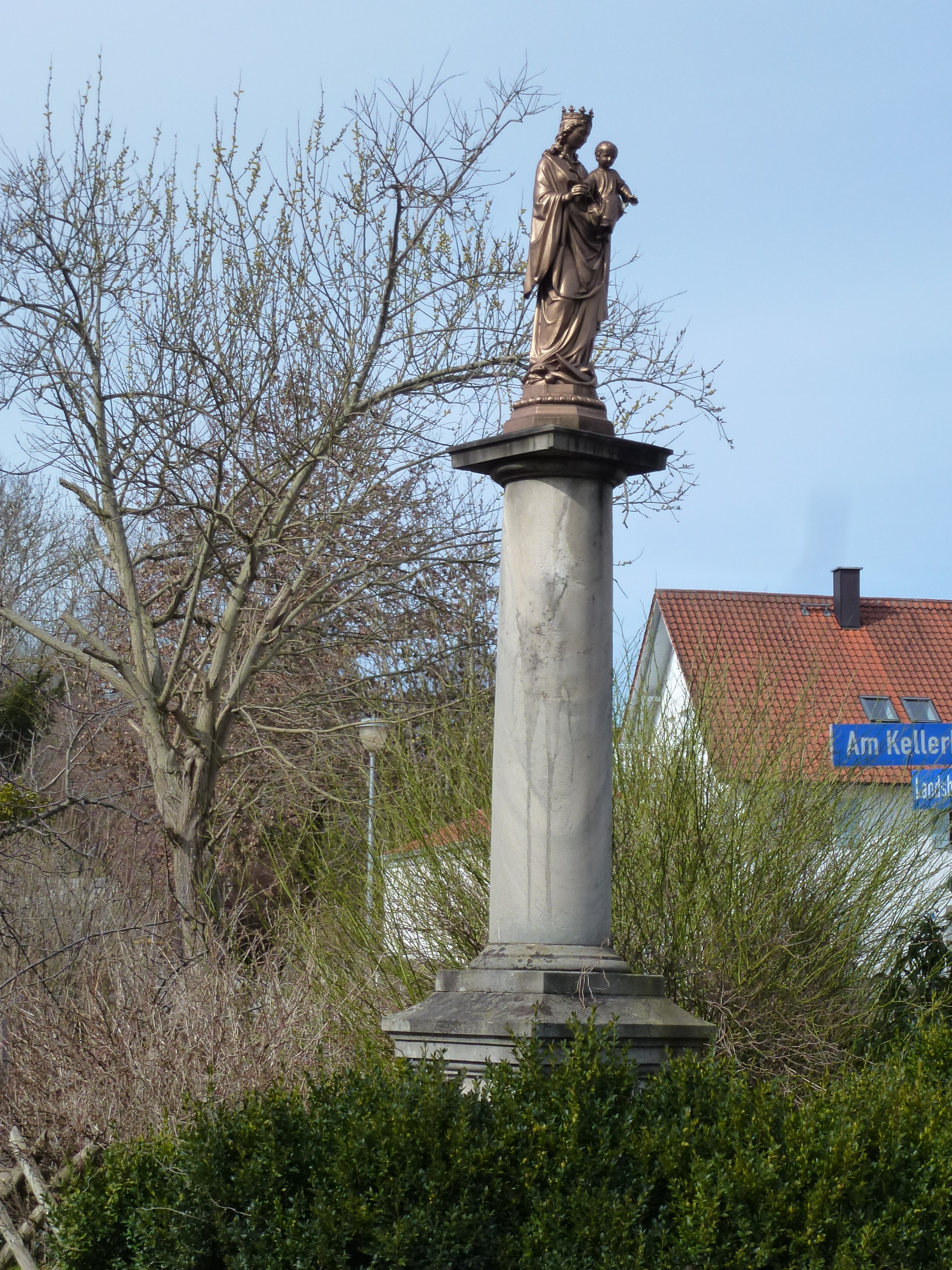 Windach_Landsberger Str7 Mariensäule. Maria mit dem Kind, auf dem Mond stehend, mit Eierstab-Dekor am Sockel. Ansicht von Nord-Osten